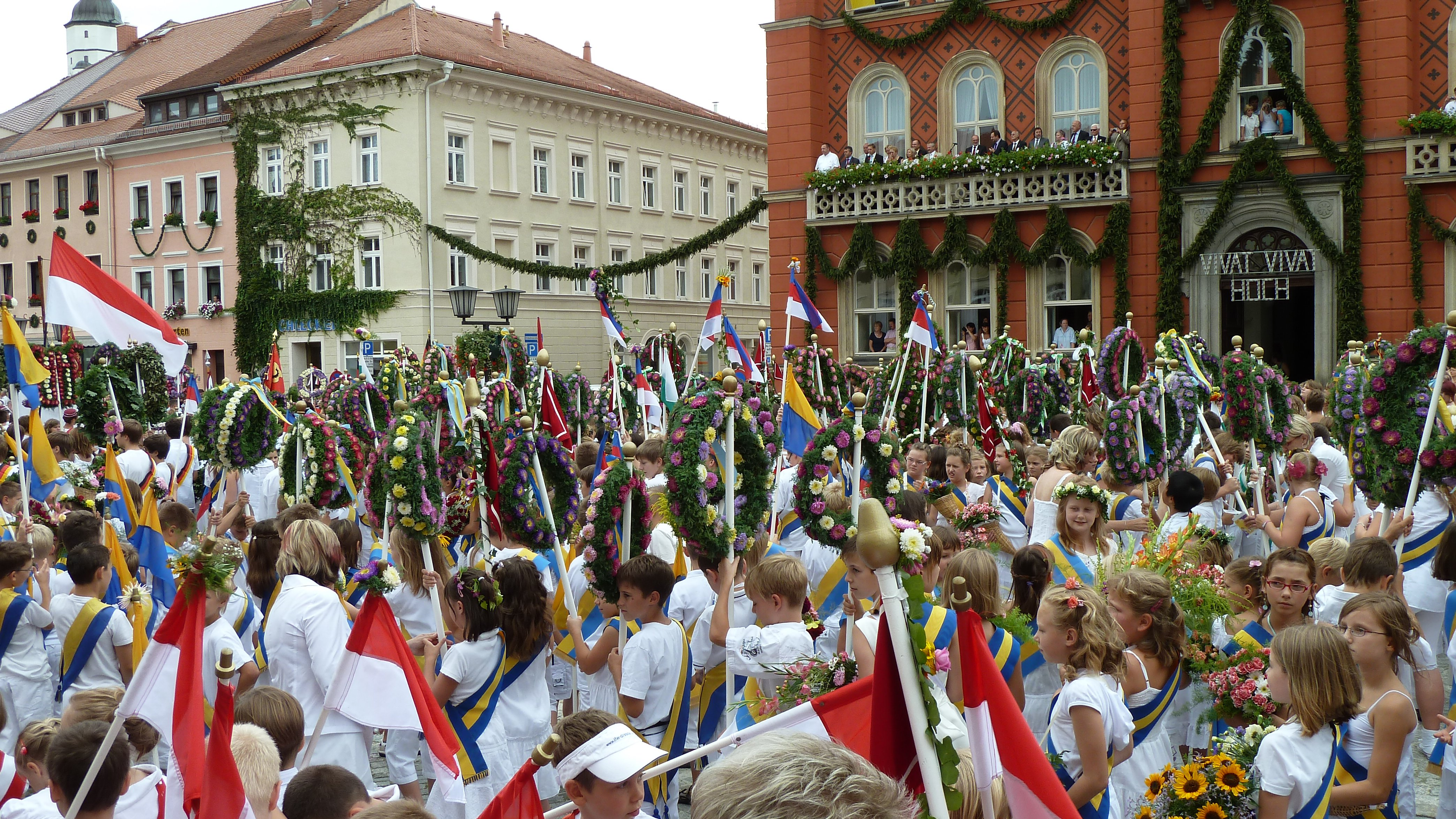 Aufmarsch der Schüler auf dem Marktplatz zum Forstfest in Kamenz 2010